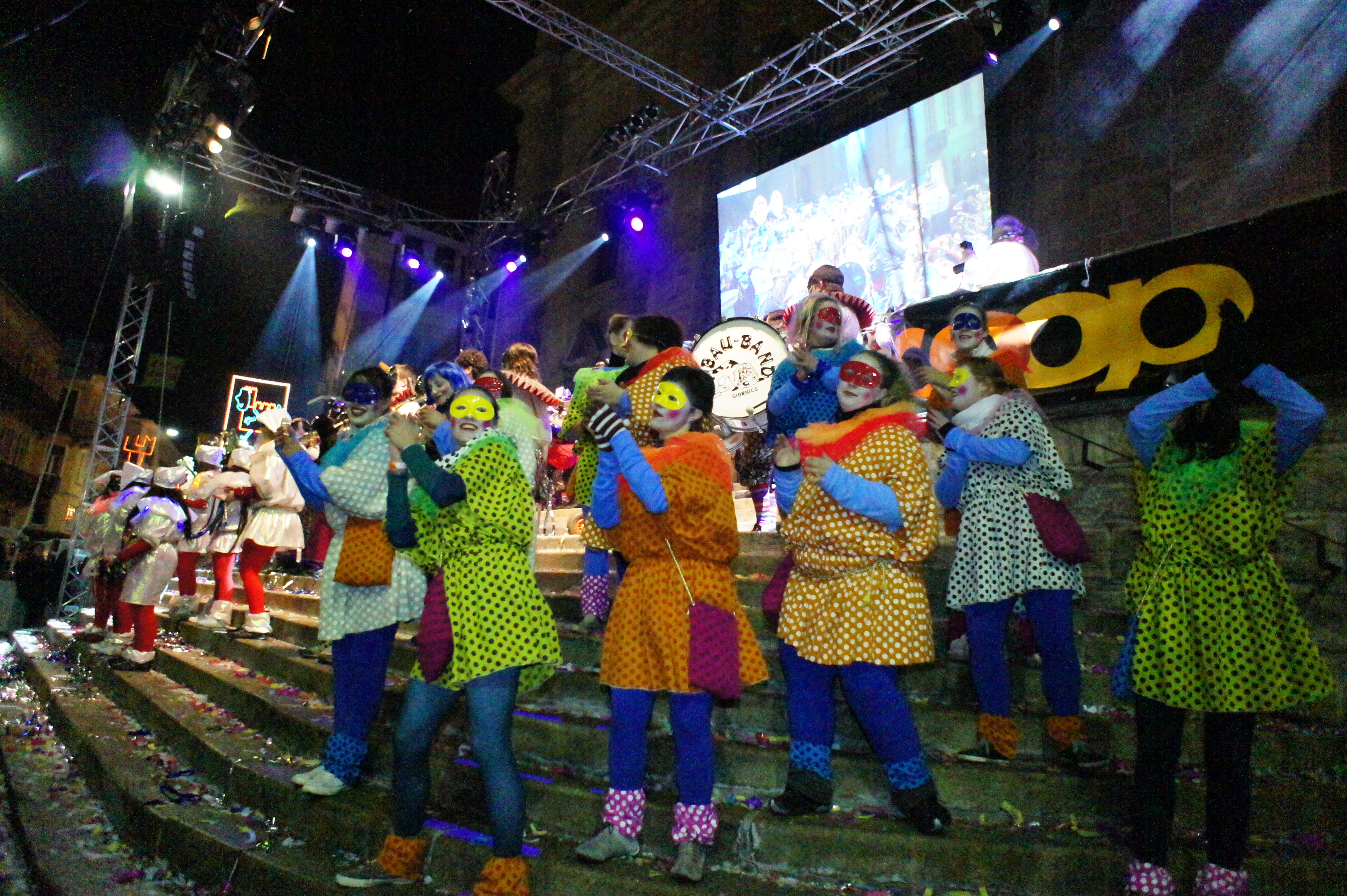 scene del Rabadan di Bellinzona del 2012